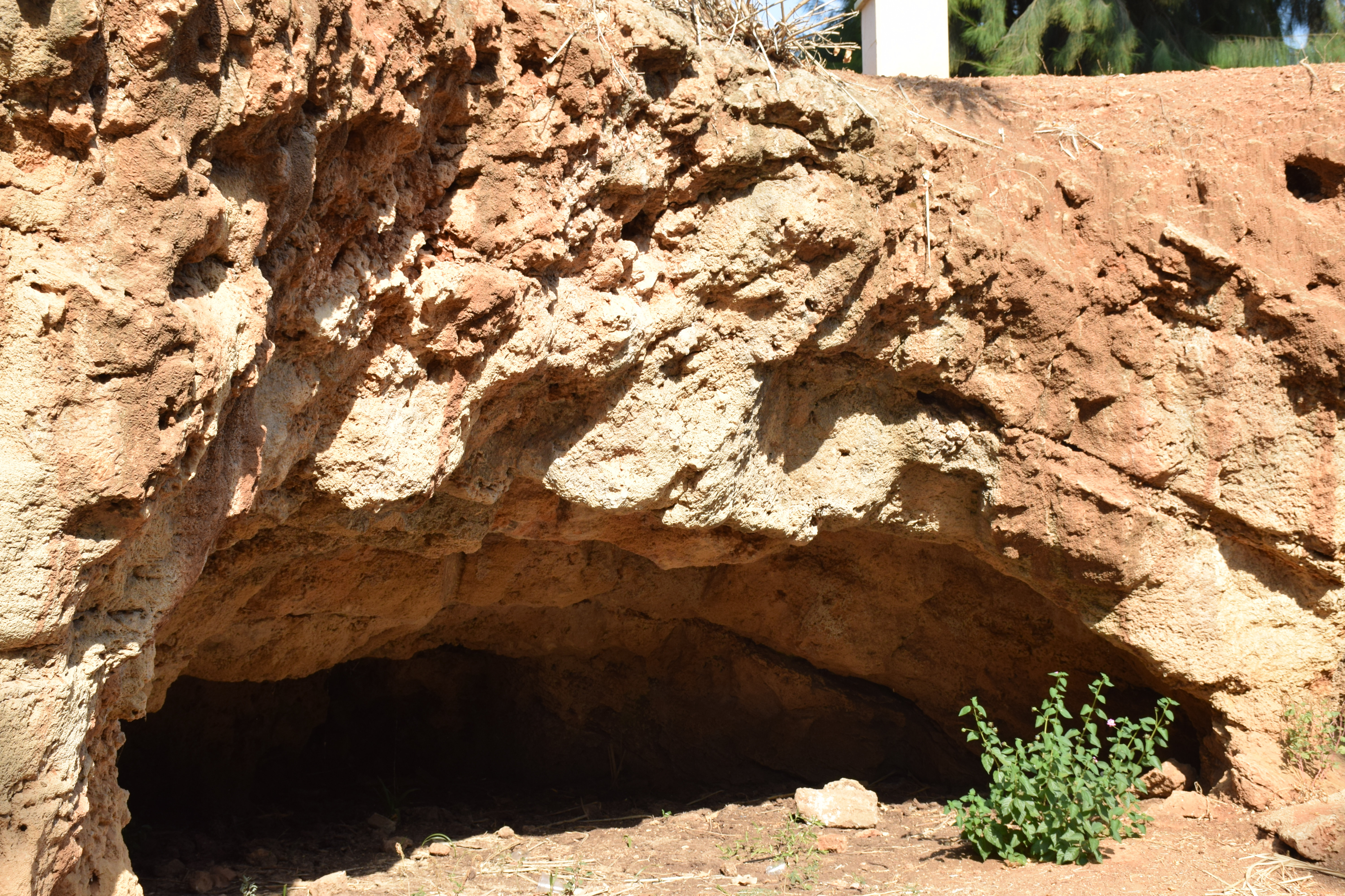 מערת נטר-מקווה ישראל